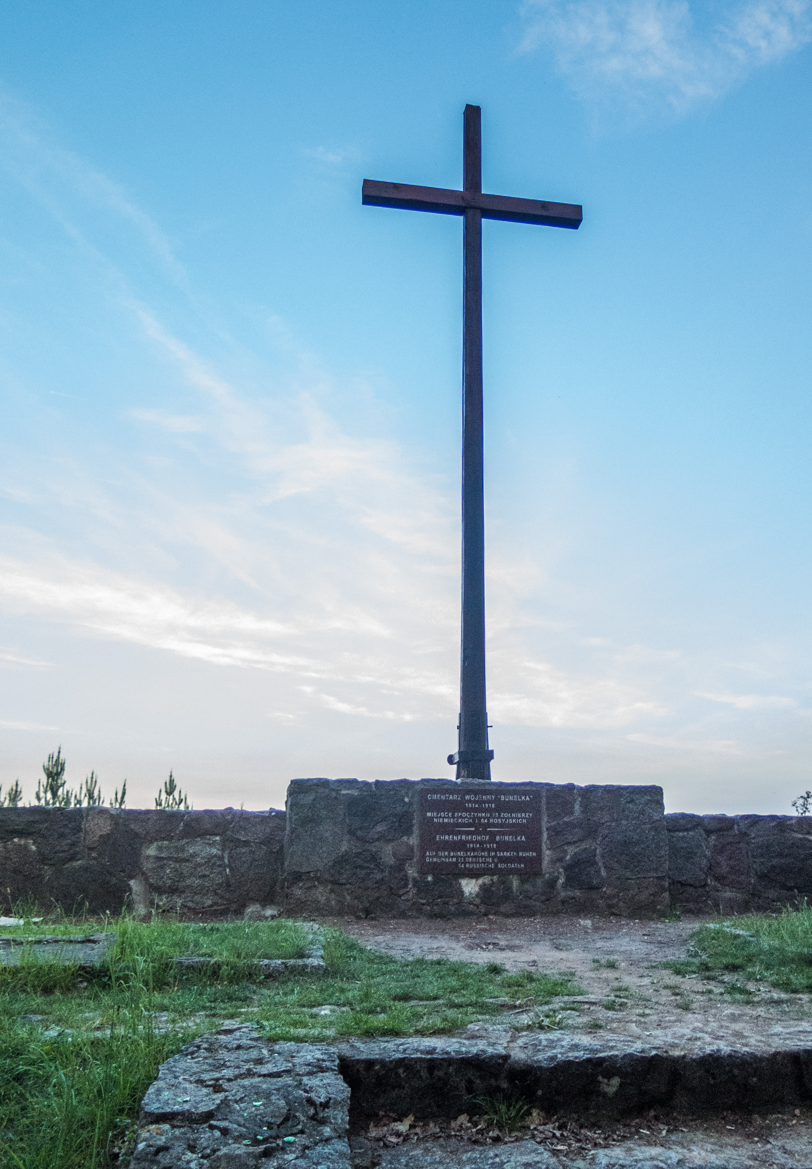 Niemiecko-rosyjski cmentarz wojenny z I wojny światowej na Górze Bunelka w miejscowości Szarek koło Ełku.